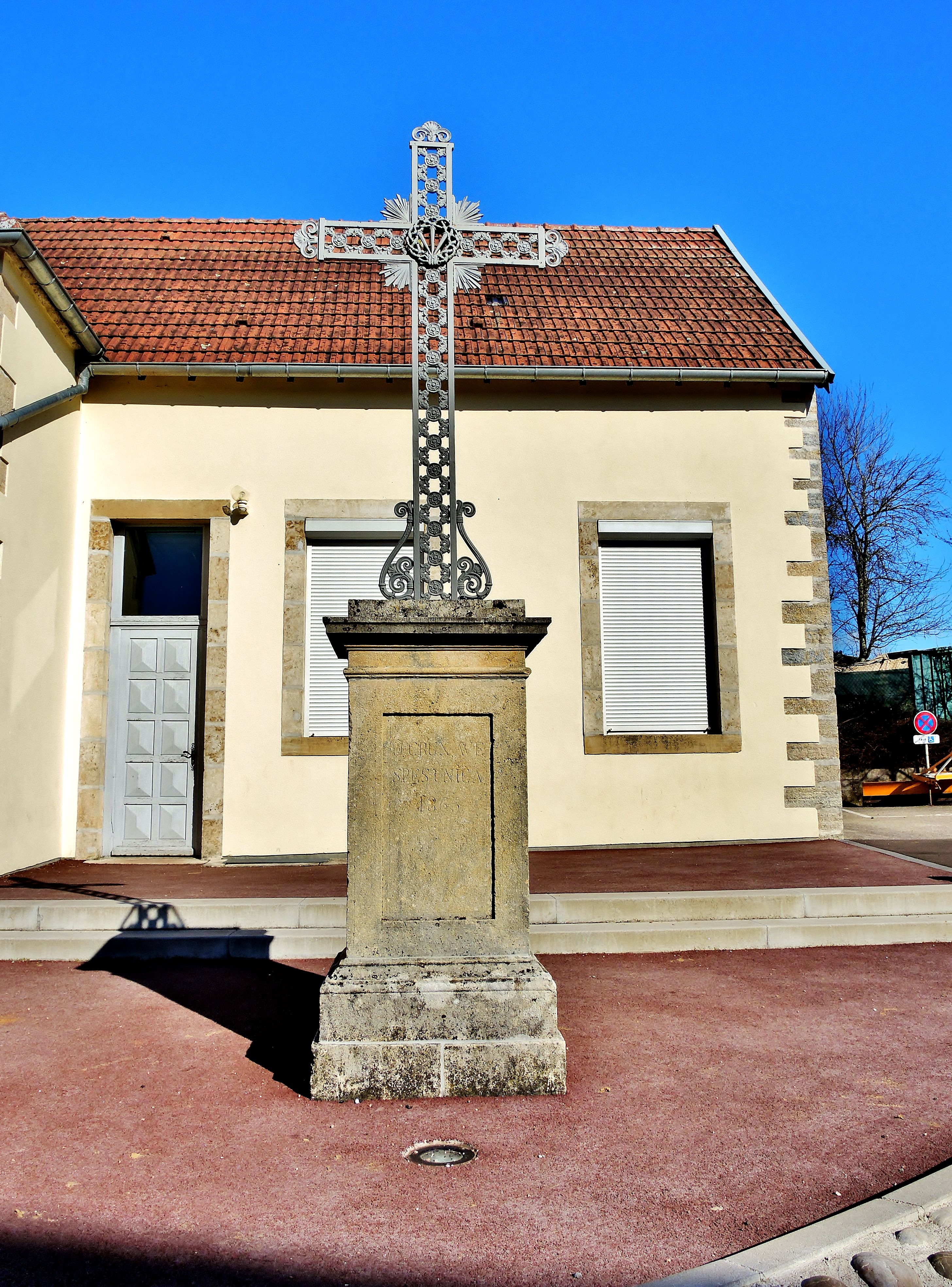 Croix datée de 1865, érigée devant la mairie de Bucey-lès-Traves. Haute-Saône.